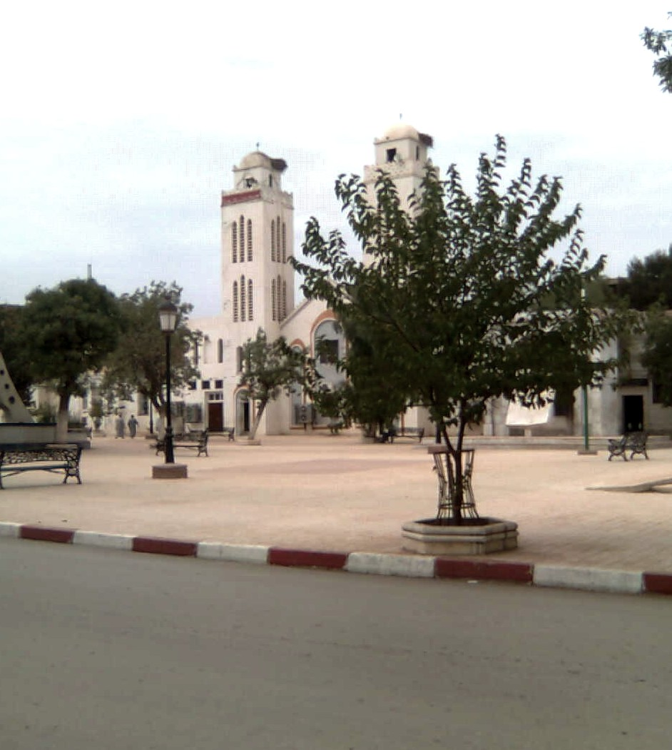 Place centrale de Tissemsilt (Algérie) avec vue sur la mosquée Bilal.